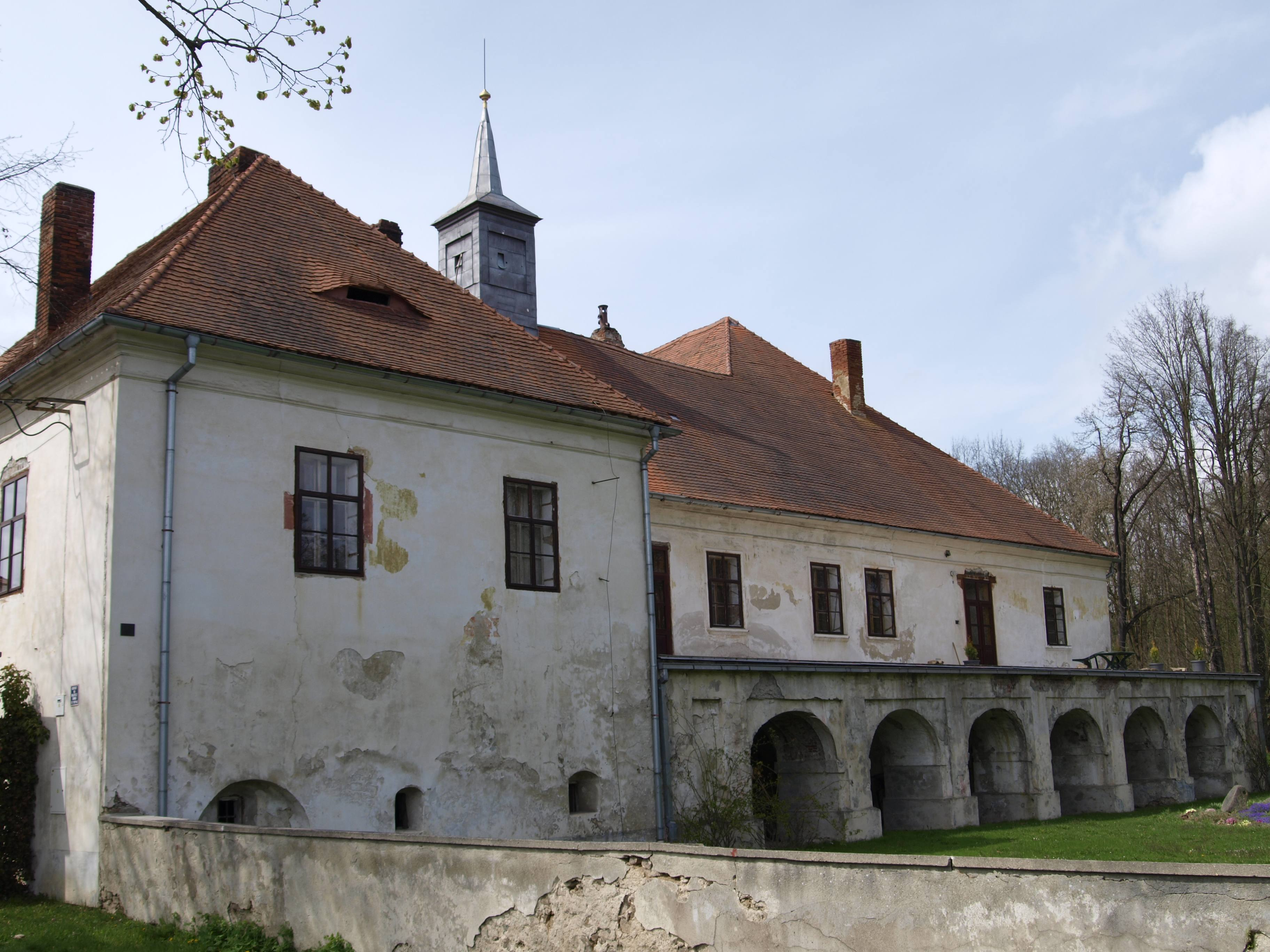 zámek, bývalá tvrz ze 16. století v obci Mačice, okres Klatovy od jihovýchodu Project: Fotíme Česko.